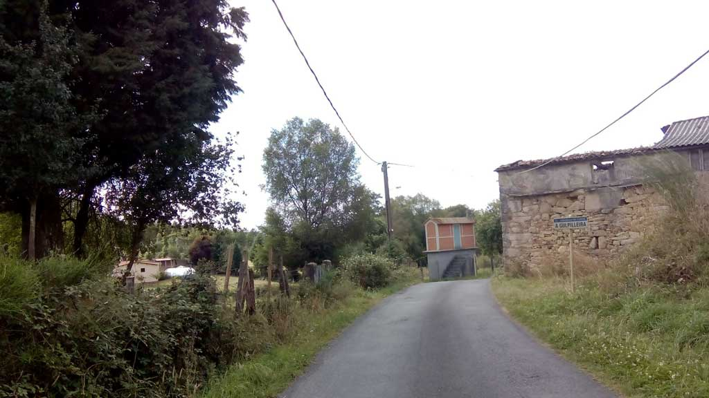 Vista da Gulpilleira, Curtis.